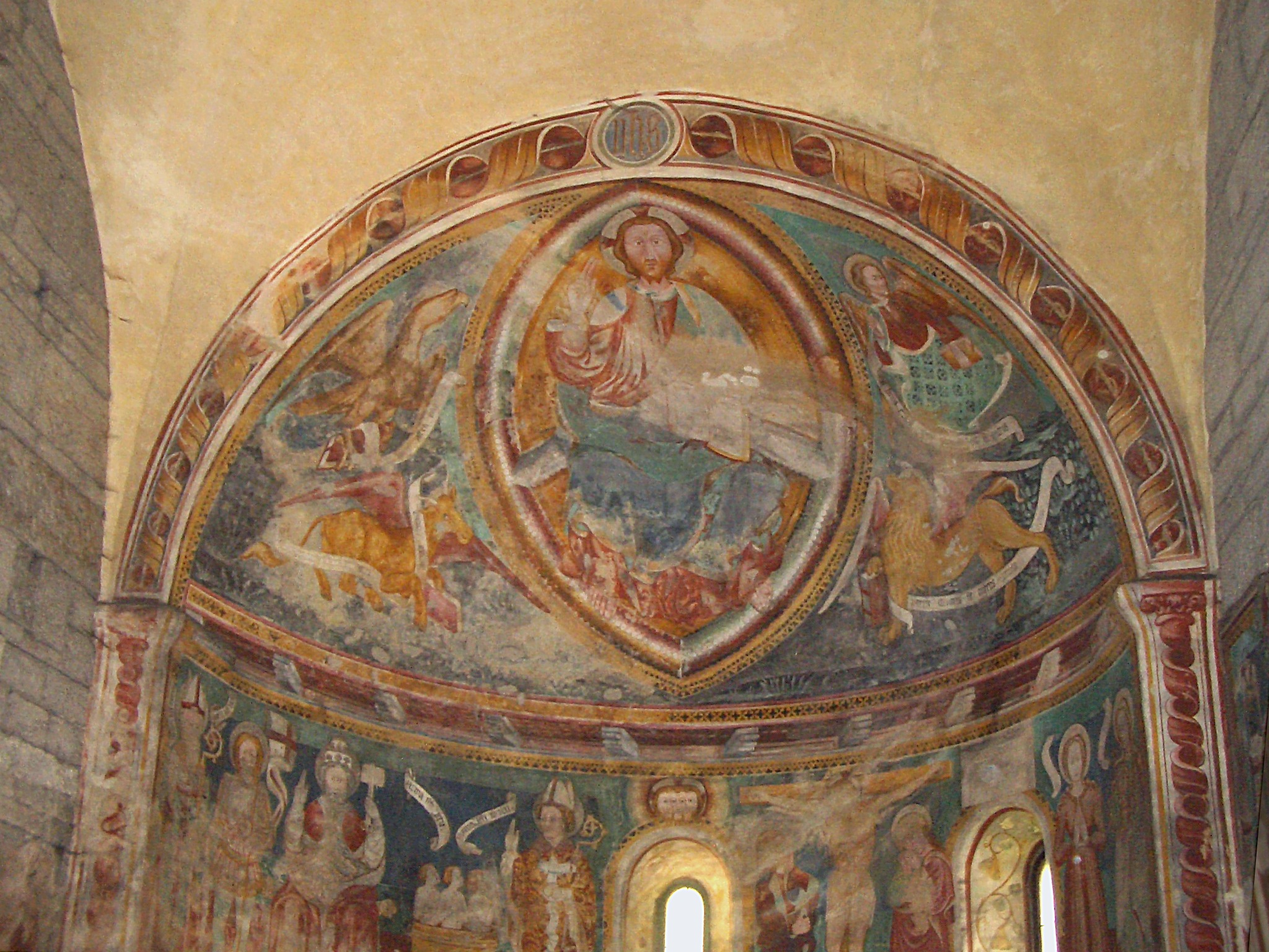 Giornico, St. Nicolao church, Nicolao da Seregno, frescoes decorating the apse, 1478